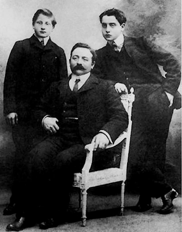 Alfred Agostini, debout à droite, avec son père et son frère Émile. Photographie vers 1905 par Paul Nadar (? le fond utilisé est typique du studio de Paul Nadar).).